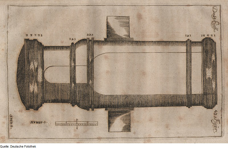 Original image description from the Deutsche Fotothek Kriegskunde & Artillerie & Geschütz